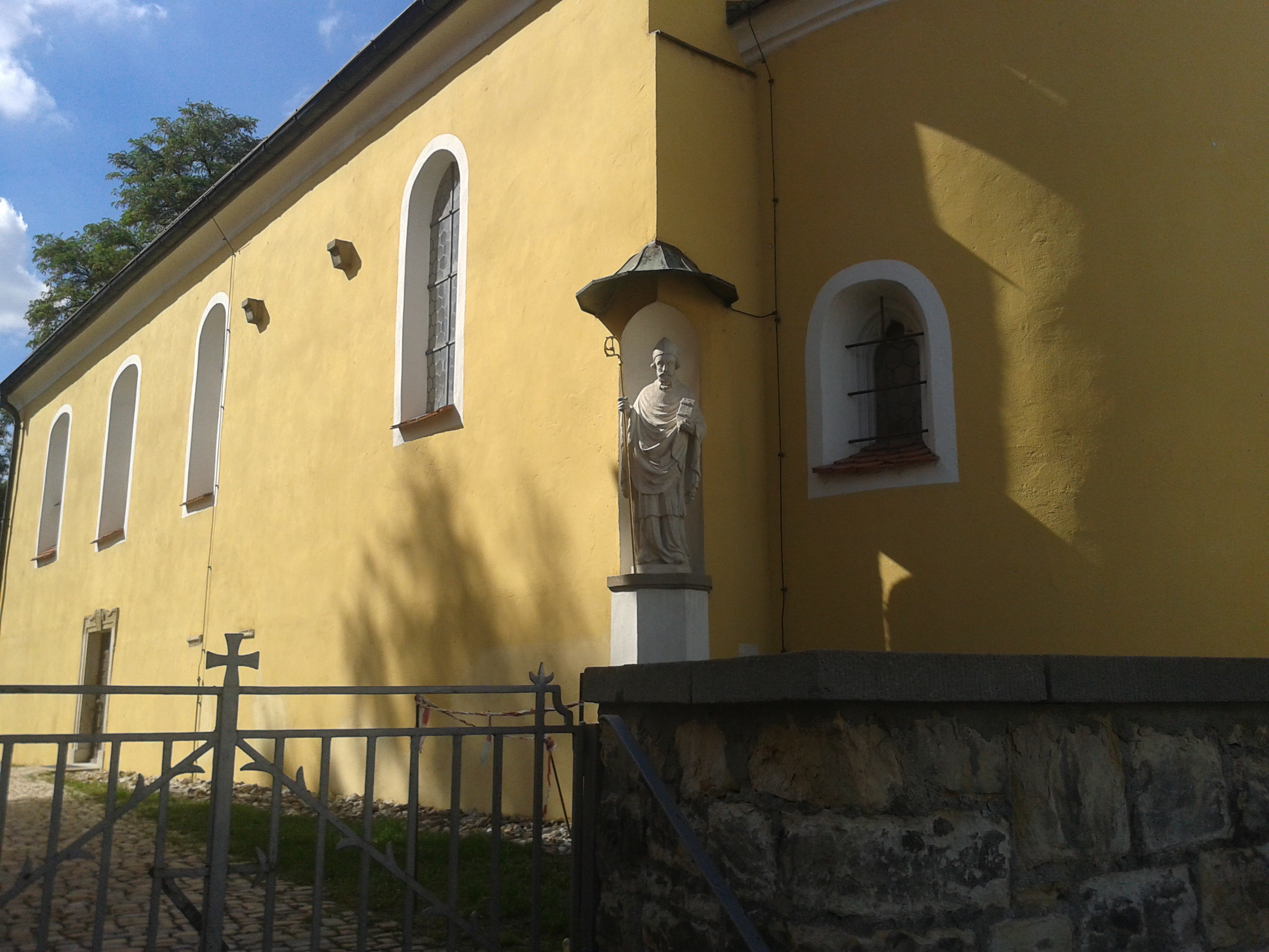 St. Nikolaus-Kirche zu Reinhausen - Regensburg; Ansicht einer Kopie der Nikolausstatue aus dem 14. Jhd.; nicht sichtbar ist das Podest, auf dem die ganze Kirche steht (ca. 1,50m)